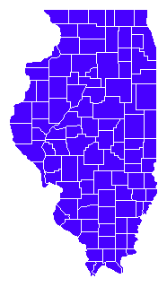 La totalité des comtés de l'État de l'Illinois optent pour le candidat démocrate.